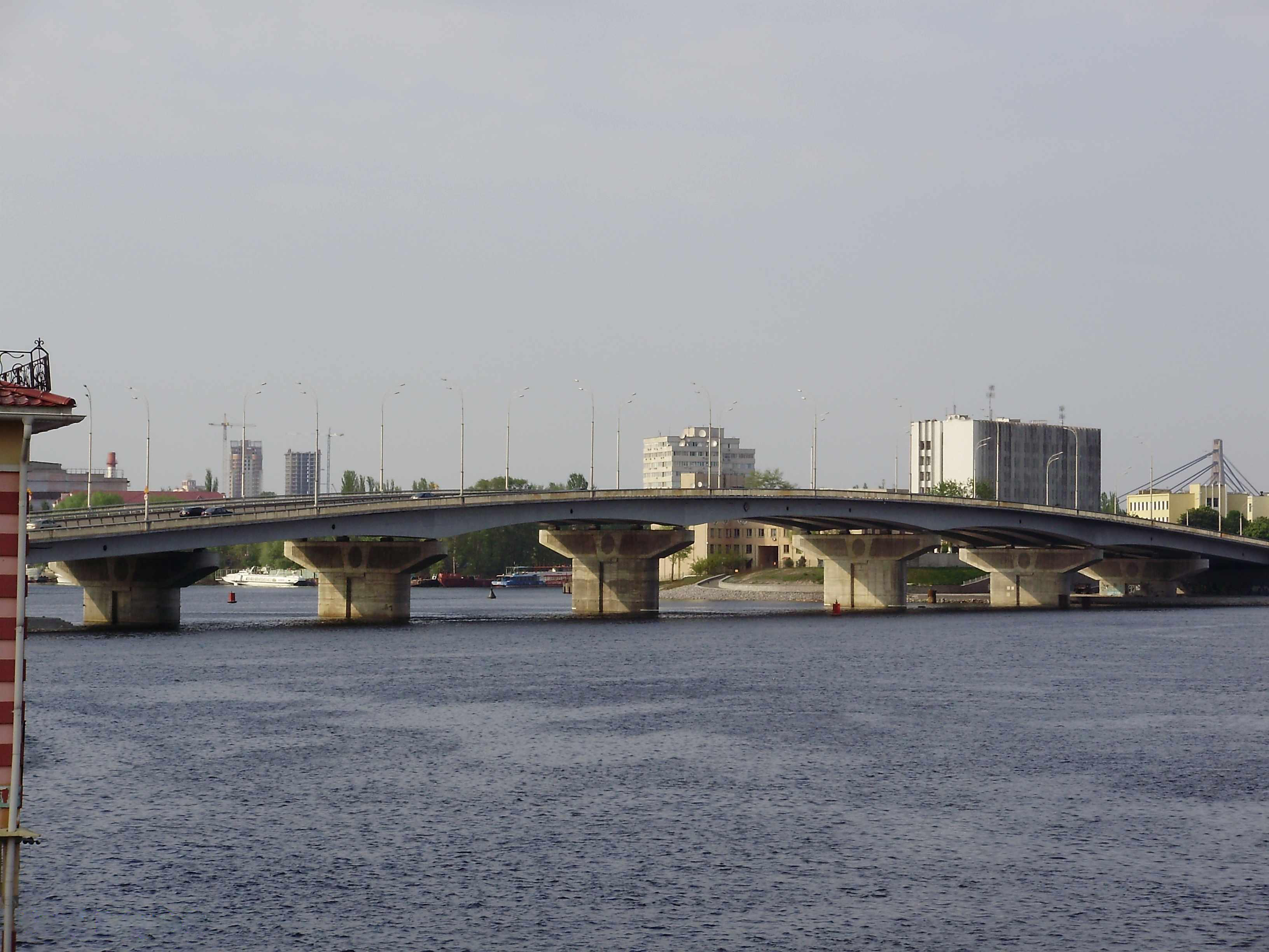 Новы мост на Рыбальскую паўвыспу. Кіеў, Украіна